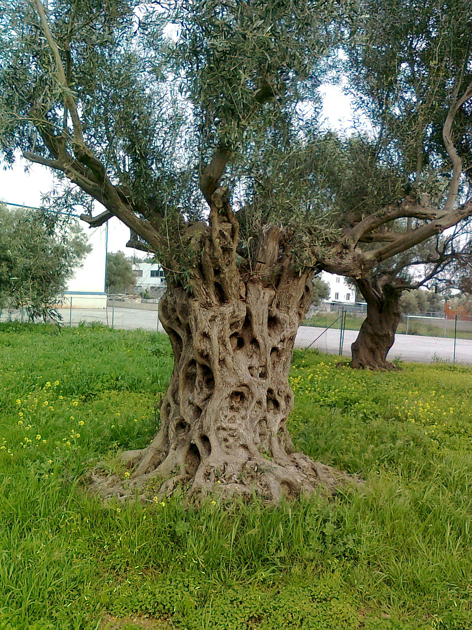 Маслинено дърво